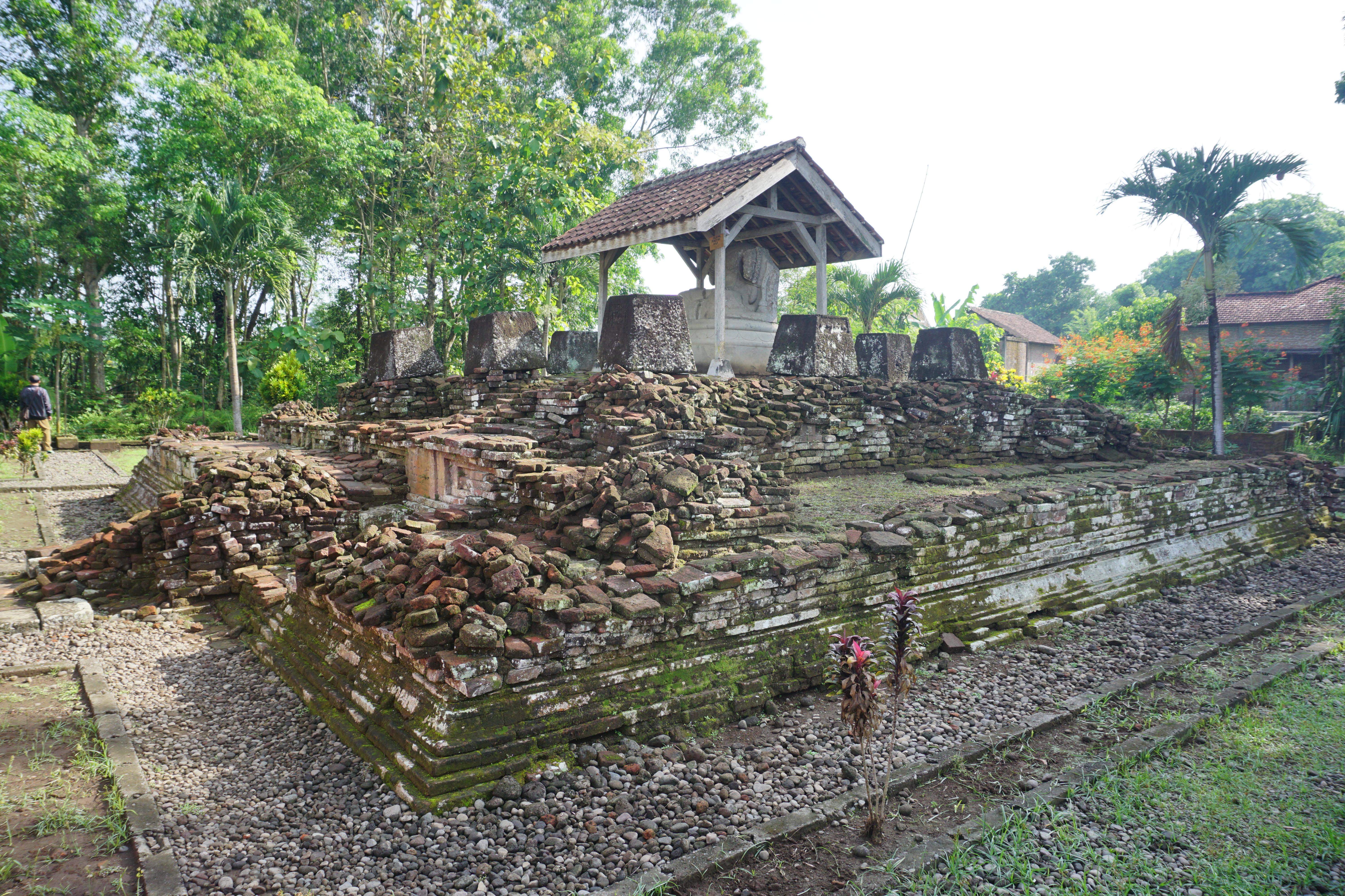 Blitar and Tulungagung, East Java